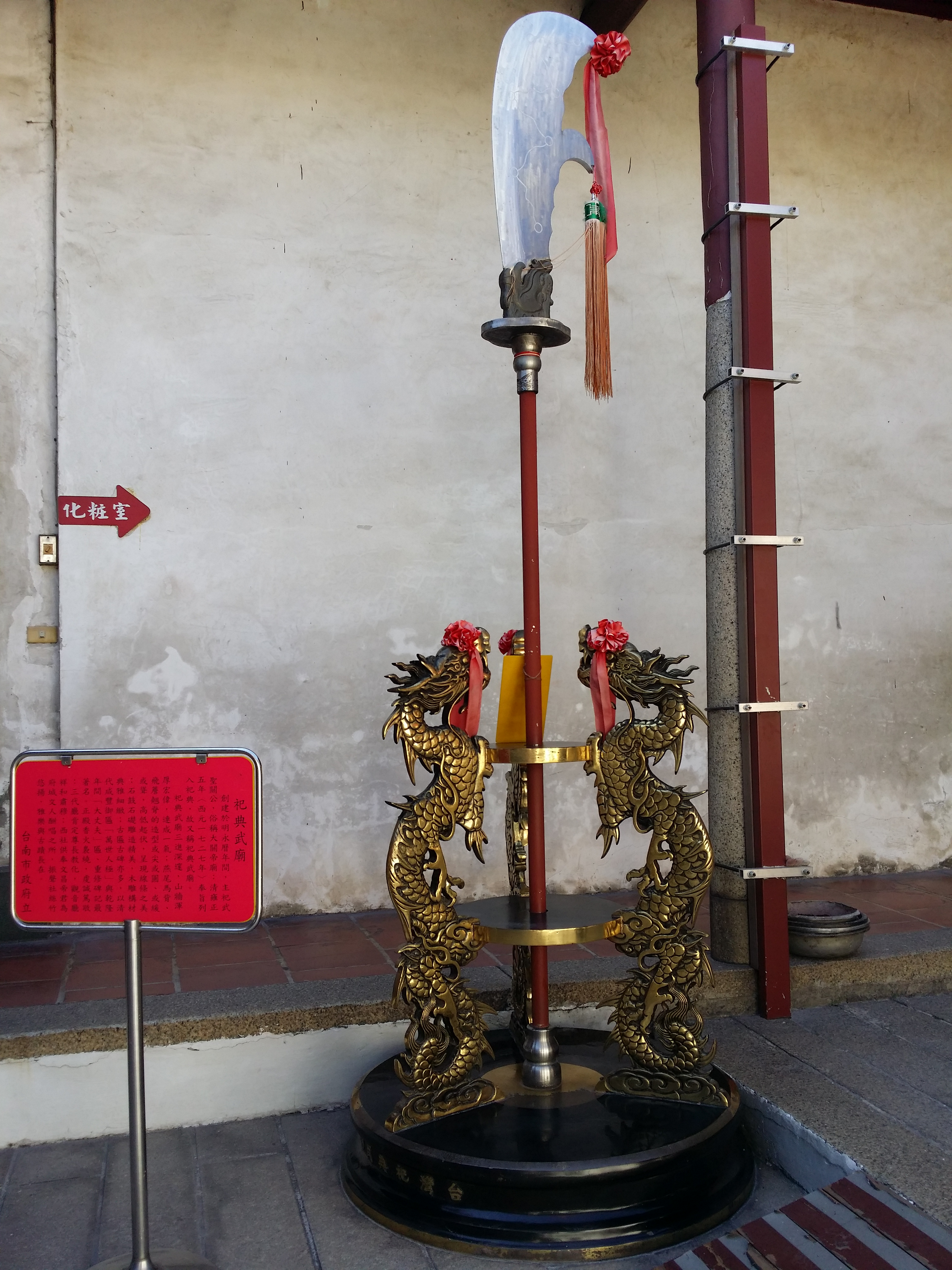 祀典武廟主祀神-關聖帝君關刀(青龍偃月刀)